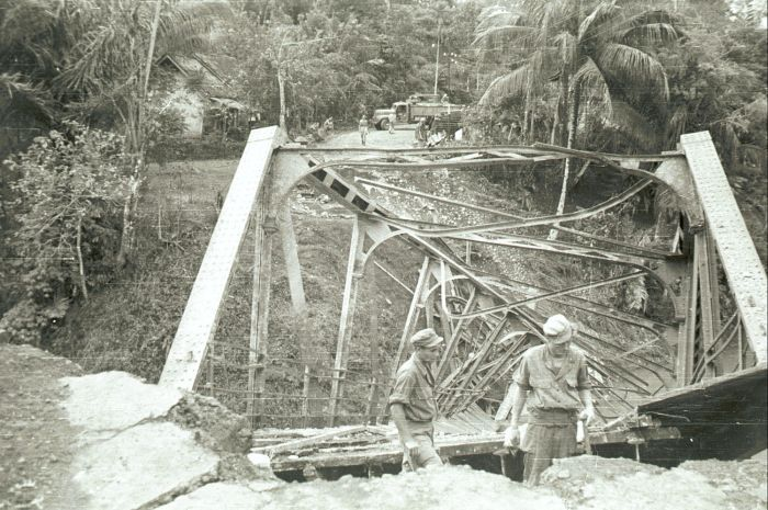 negatief. Militairen van de genie bij een kapotte brug, tijdens of rond de eerste politionele actie